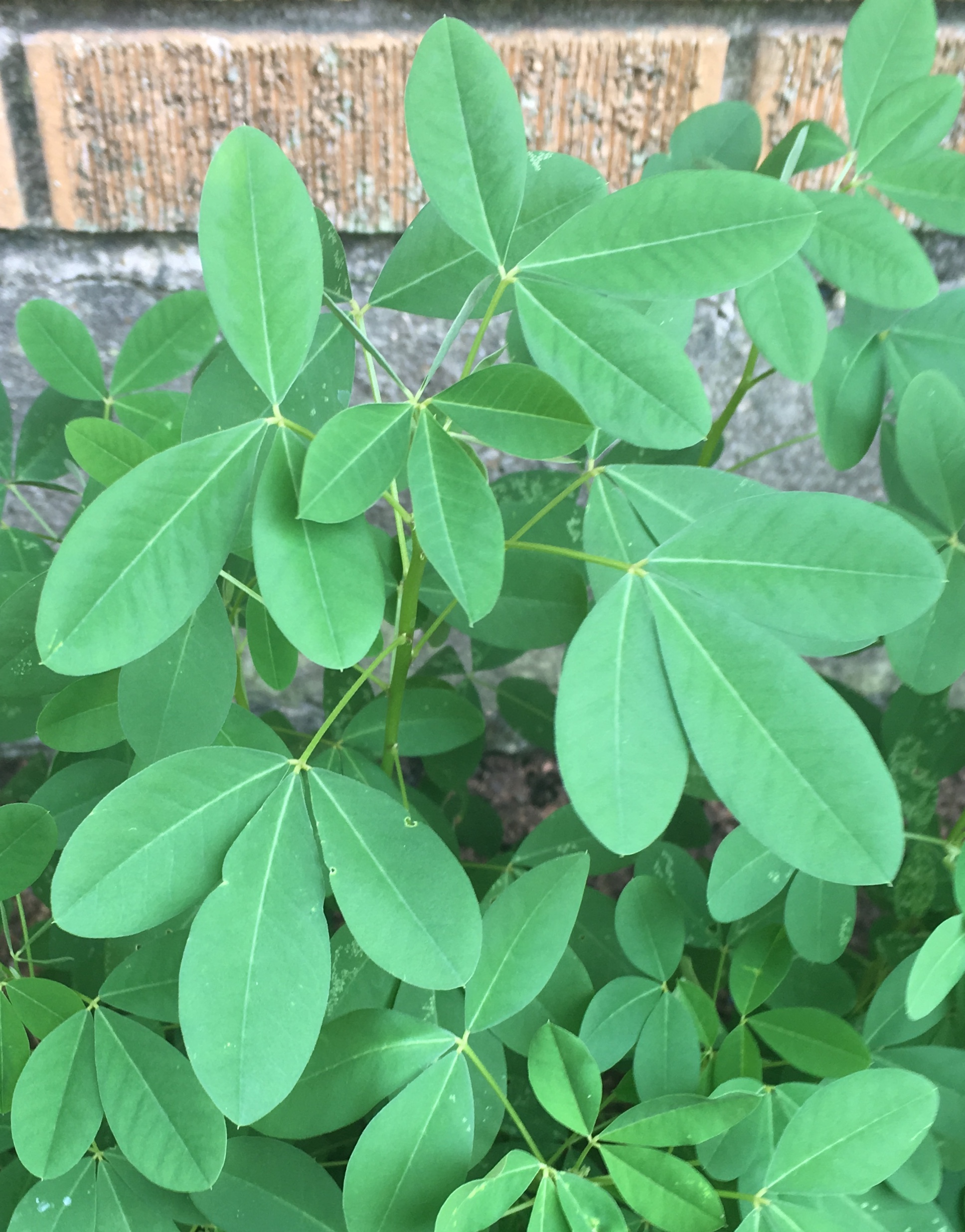 Chipilín (Crotalaria longirostrata)